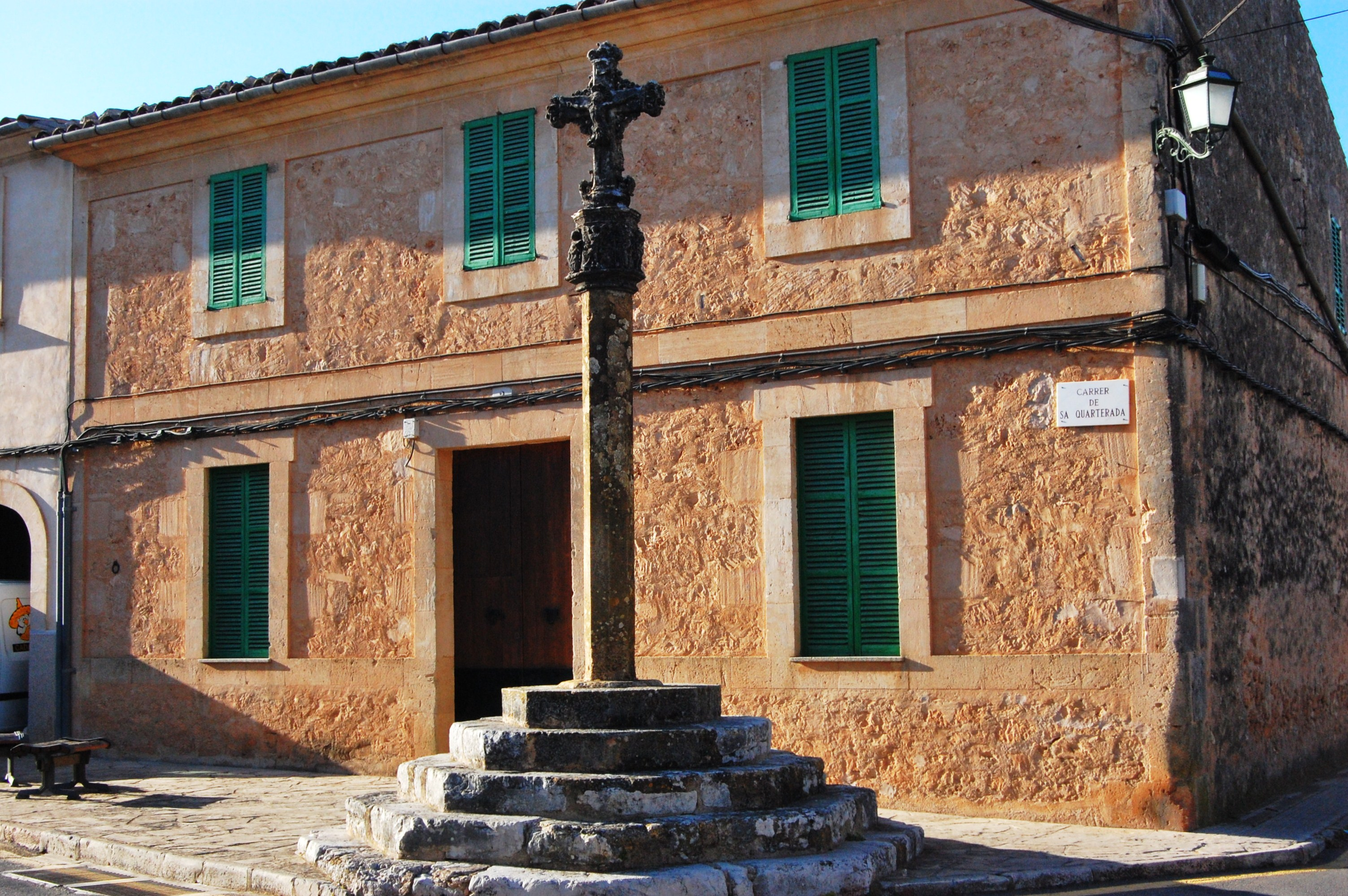 Creu des Molí des Sant (Algaida)